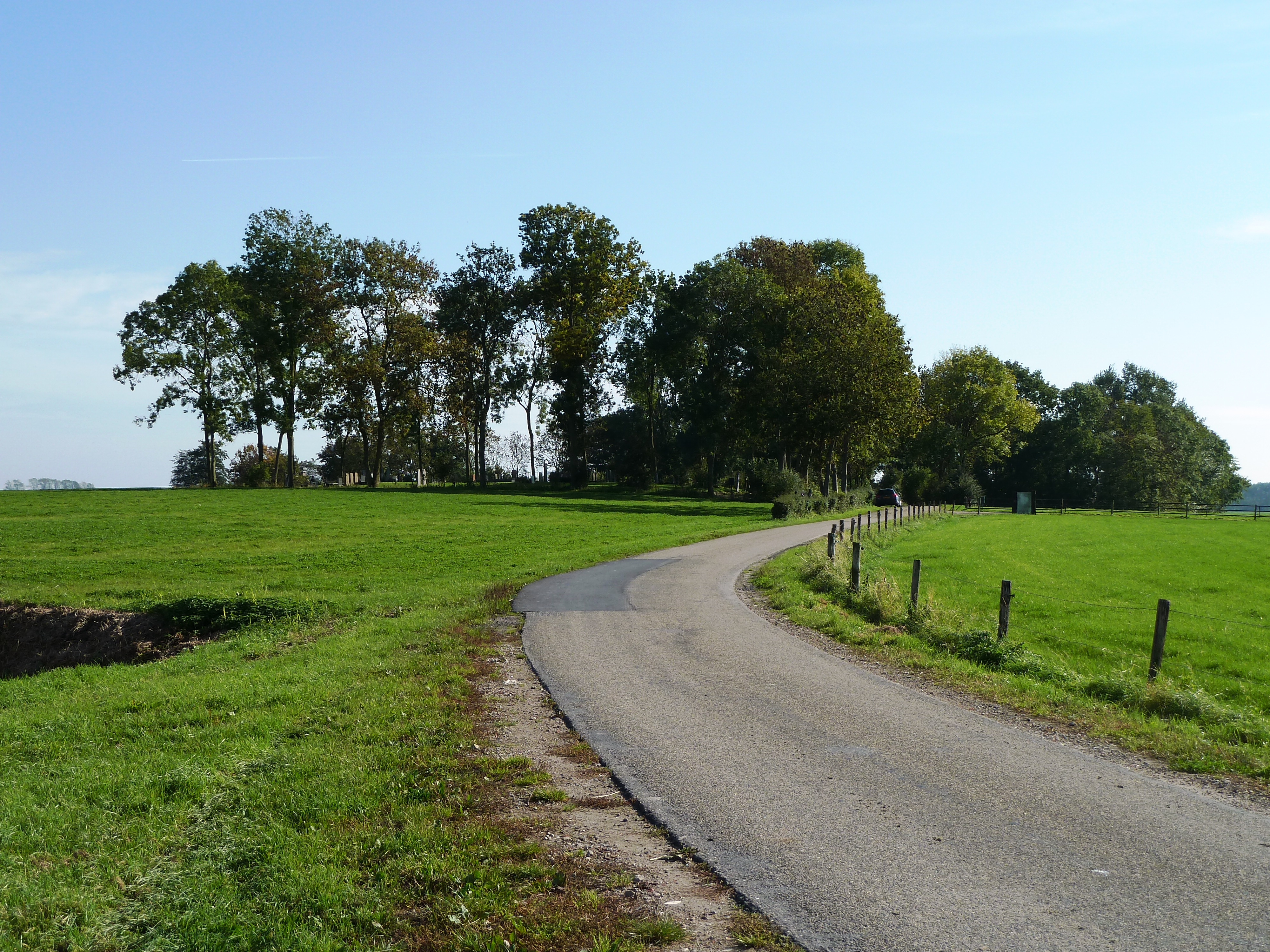 Gezicht op de wierde Wierum